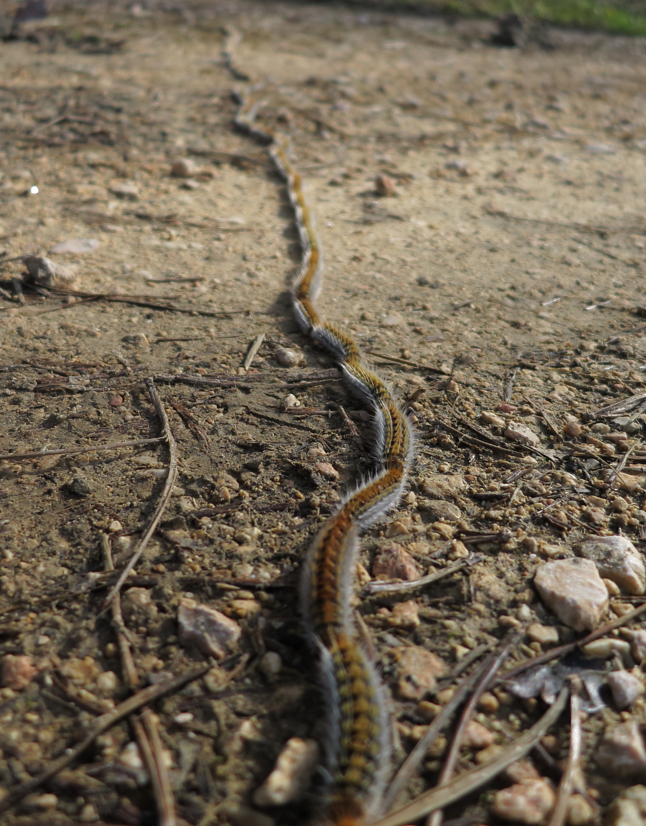 Raupen Pinien-Prozessionsspinner. Álava, Baskenland, Spanien